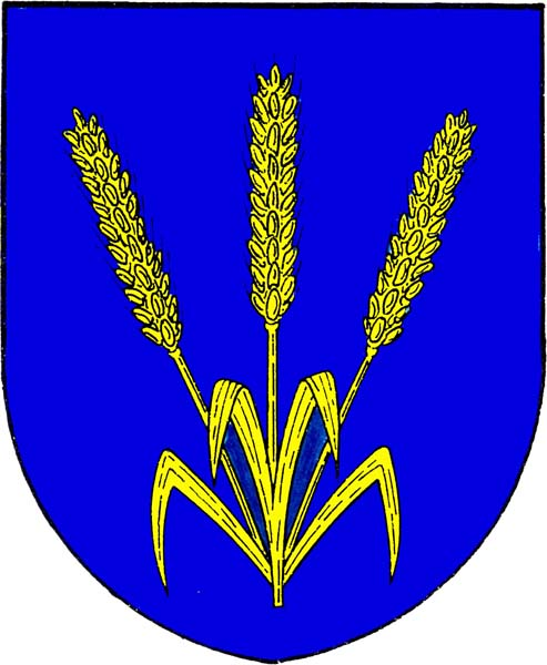 Znak obce Domašov